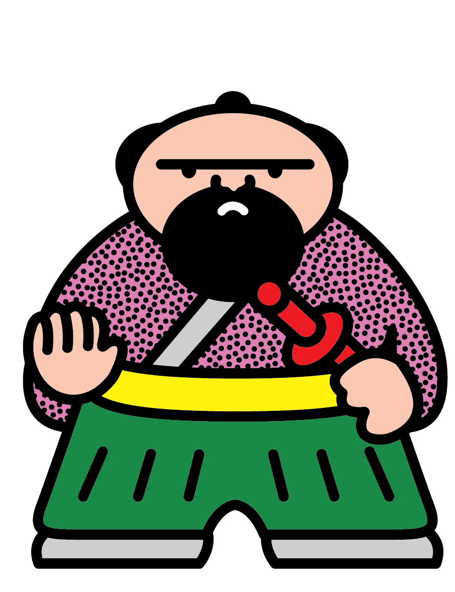 大槻太郎左衛門に関する資料は極めて少ないため、「大槻太郎左衛門プロジェクト」によりこのイメージキャラクターが作成された。